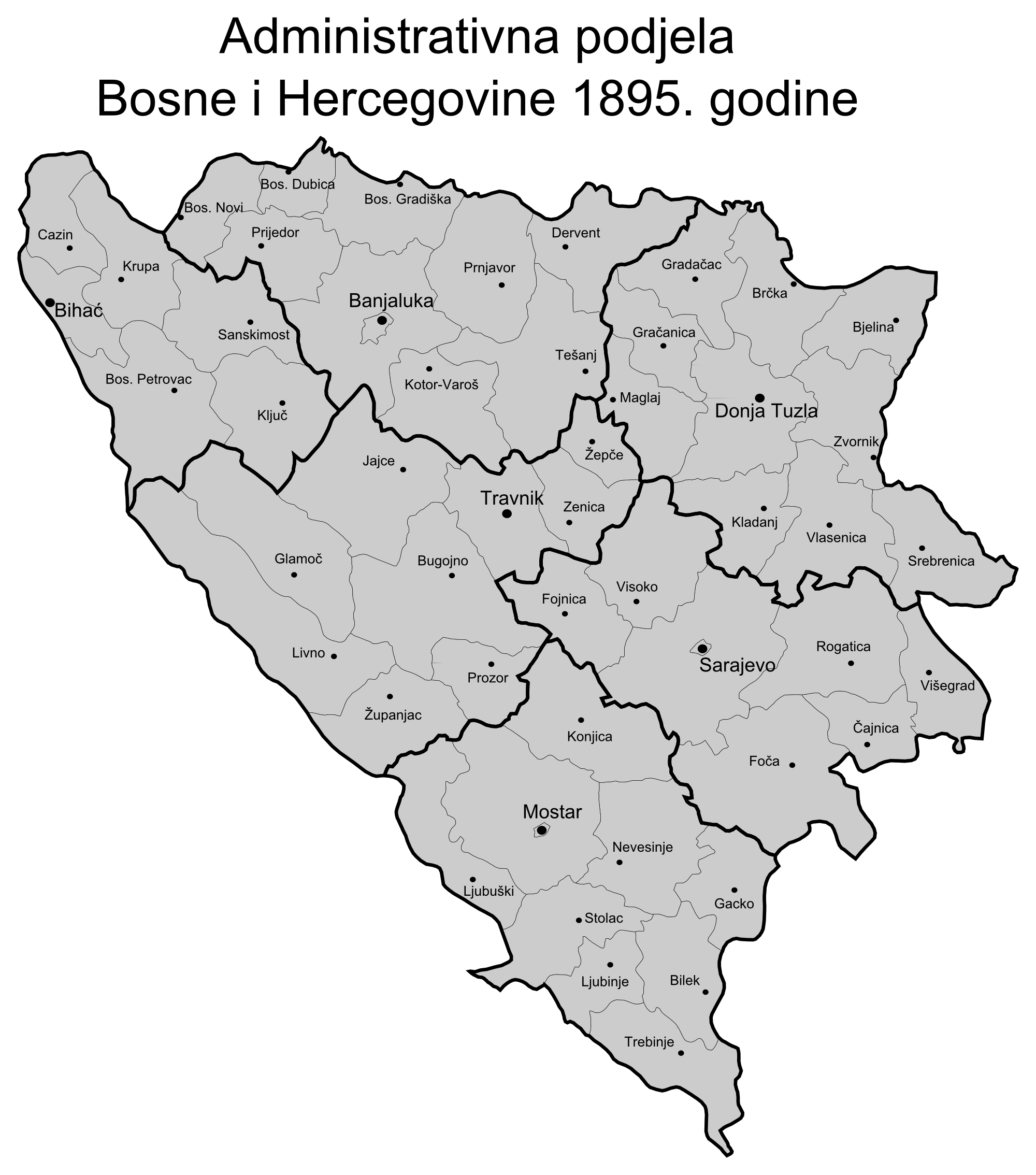 Administrativna podjela Bosne i Hercegovine 1895. godine